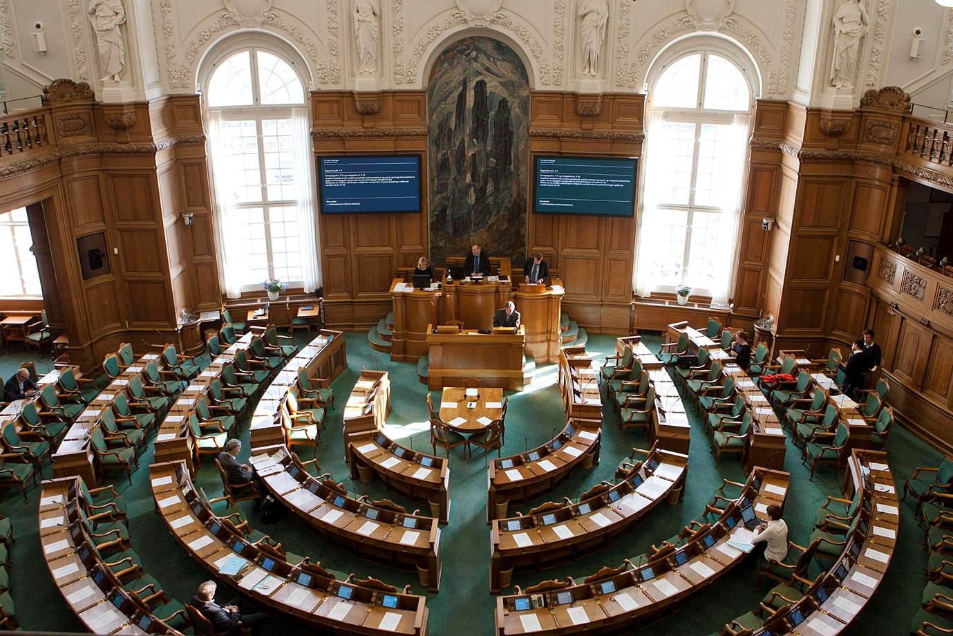 Det danske parlament